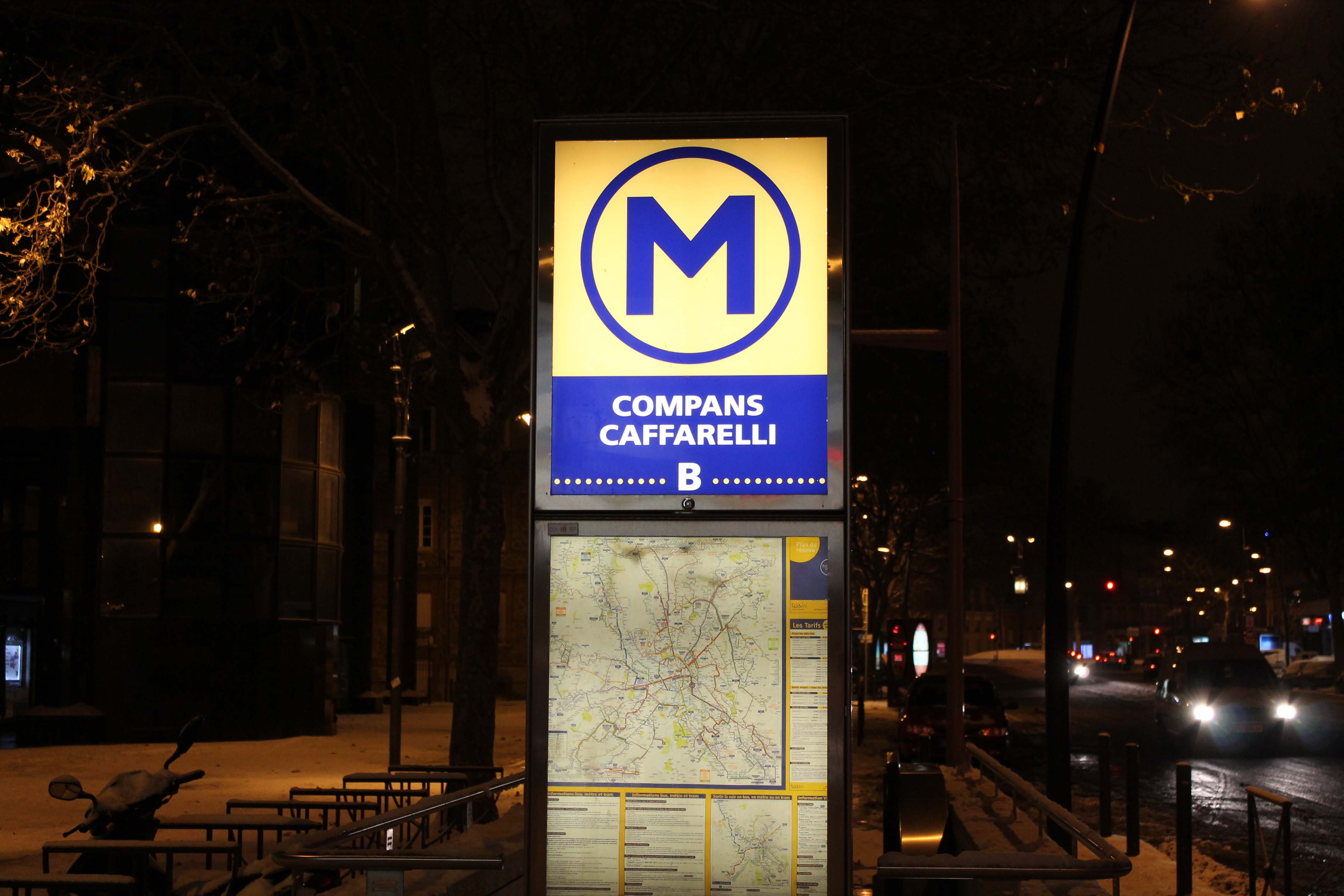 L'édicule de la station Compans Caffarelli, Ligne B du métro de Toulouse